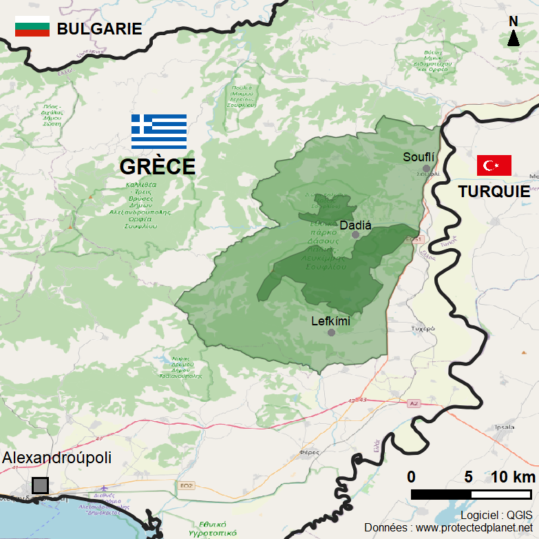 Emprise du parc national forestier de Dadiá-Lefkími-Souflí avec la zone cœur en vert foncé et la zone périphérique en vert plus clair. UNEP-WCMC and IUCN (2020), Protected Planet: Ethniko Parko Dasous Dadias - Lefkimmis - Soufliou in Greece/Ethniko Parko Dasous Dadias - Lefkimmis - Soufliou Periochi Prostasias Tis Fysis Zoni A1 in Greece/Ethniko Parko Dasous Dadias - Lefkimmis - Soufliou Periochi Prostasias Tis Fysis Zoni A2 in Greece ; The World Database on Protected Areas (WDPA)/The Global Database on Protected Areas Management Effectiveness (GD-PAME) [On-line], Cambridge, UK. Data provided by the European Environment Agency (EEA). Available at: Basemap: OpenStreetMap. Free software: QGIS. Creation: Iolchos07.